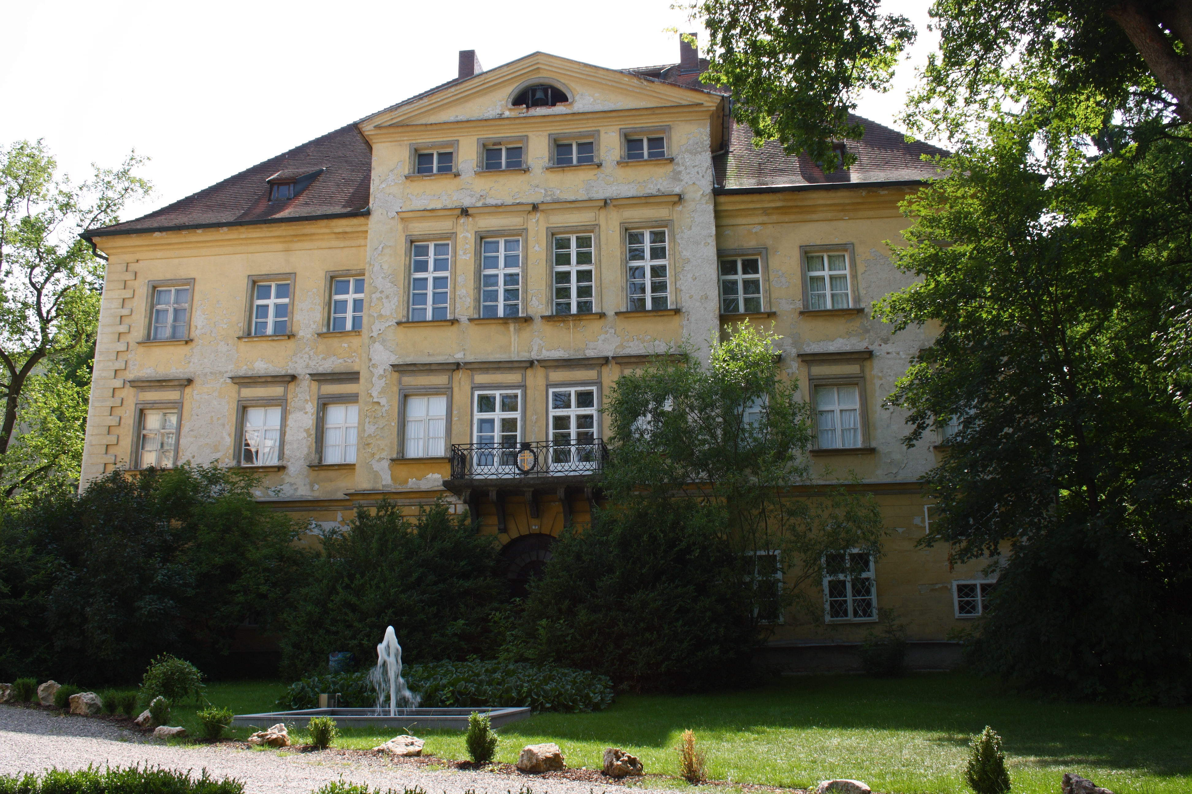 Schloss Autenried in Autenried, einem Ortsteil von Ichenhausen im Landkreis Günzburg (Bayern), ursprüngliches Wasserschloss (16. Jahrhundert), 1709 Neubau durch Johann Georg Reiner